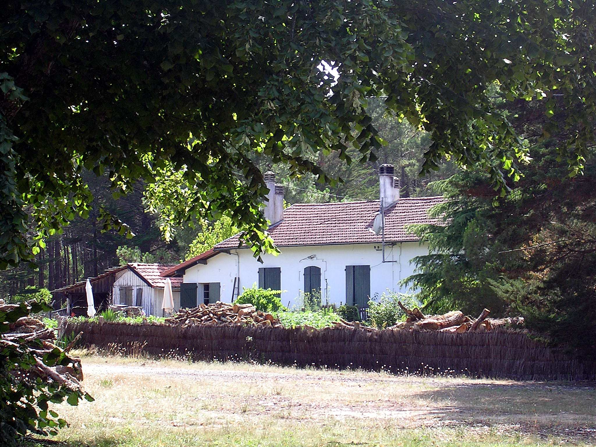 Maison forestière ONF de Lespecier, à Mimizan Plage, dans le département français des Landes